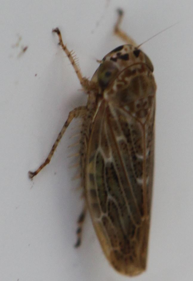 Euscelidius variegatus am 6.9.2017 südlich von Mannheim